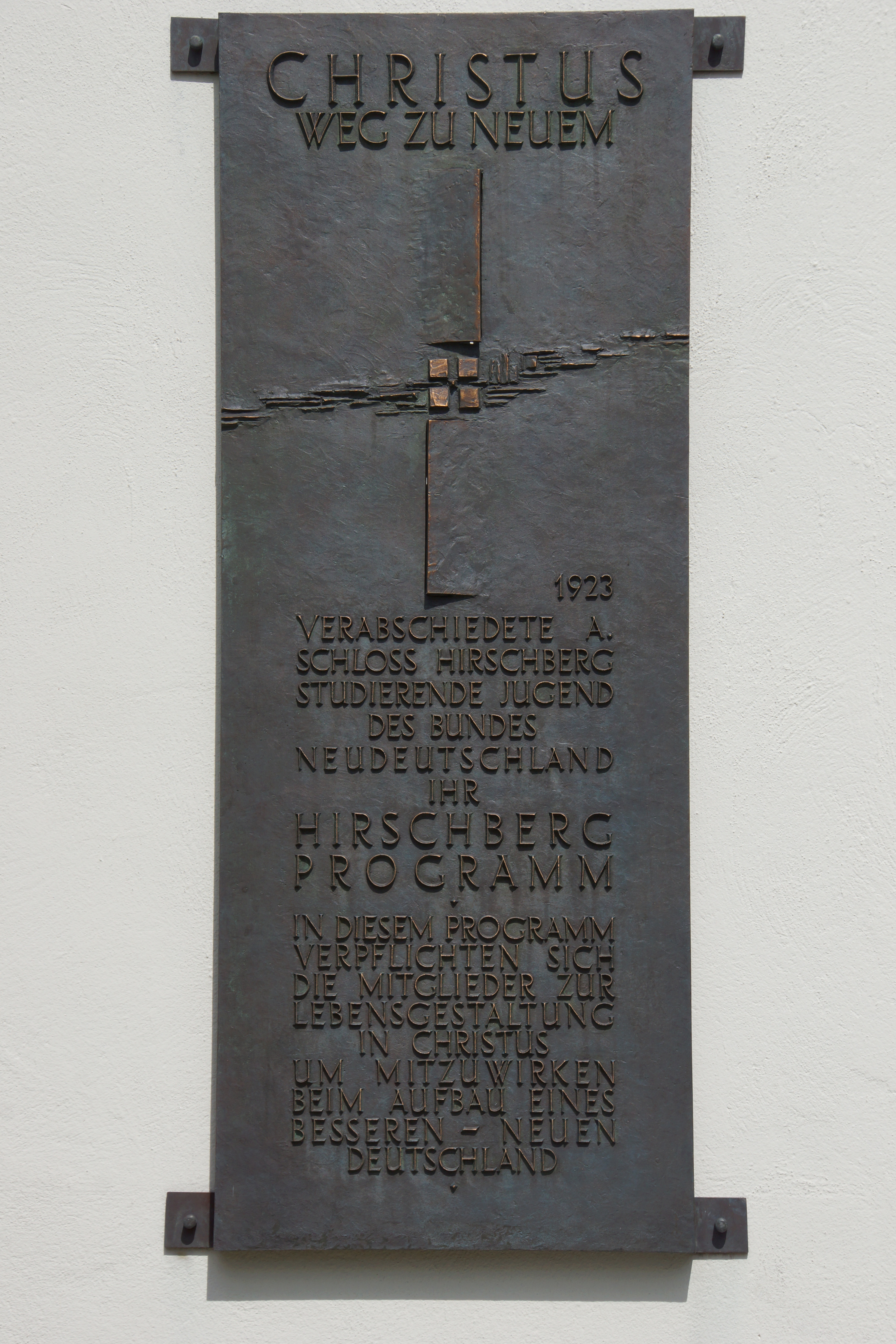 Das Schloss Hirschberg bei Beilngries im Altmühltal: Gedenktafel an die Verabschiedung des Hirschbergprogramms des Bundes Neudeutschland im Jahr 1923